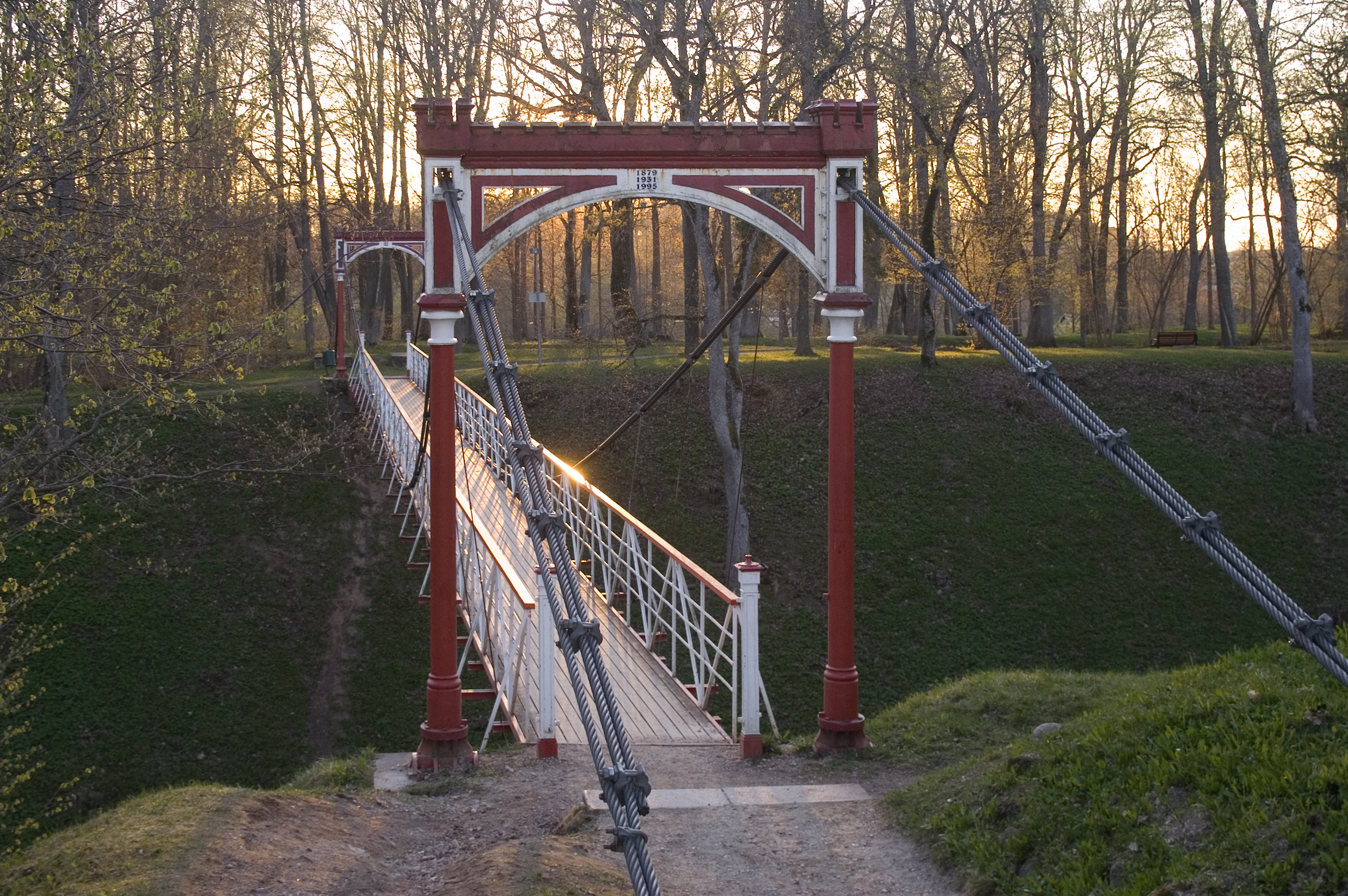 1879. a Riias firma Felser & Co poolt valmistatud sild paigutati Viljandi lossimägedesse 1931.a. Algselt asus sild Tarvastu vallikraavil, et kergendada mõisnike pere juurdepääsu varemetes asuvale kabelile. Silla kinkis linnale Tarvastu mõisnik Karl von Mensenkampf. Silla pikkus on üle 50 m. Sild on paigutatud üle oru, mille sügavus on 15 m. Sild rekonstrueeriti 1995.